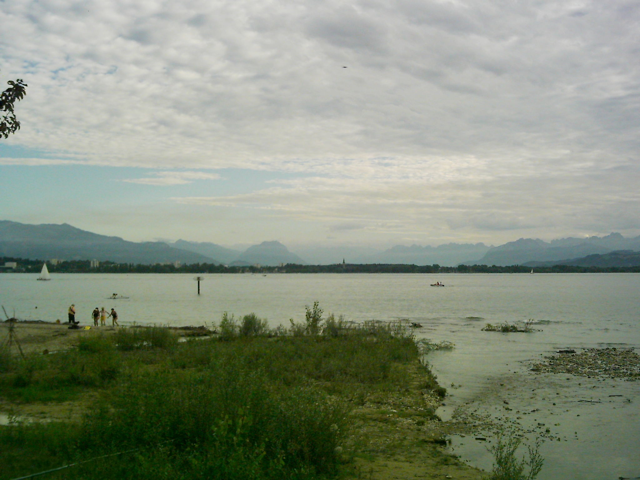 Strandbad Lochau-Hörbranz am Bodensee - Föhnende